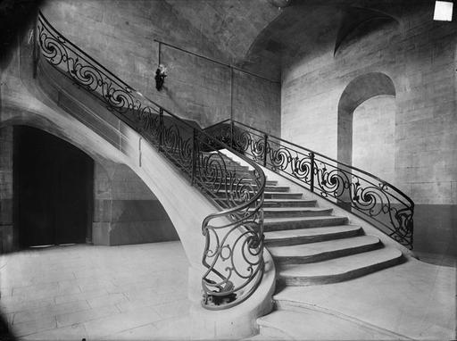 négatif monochrome